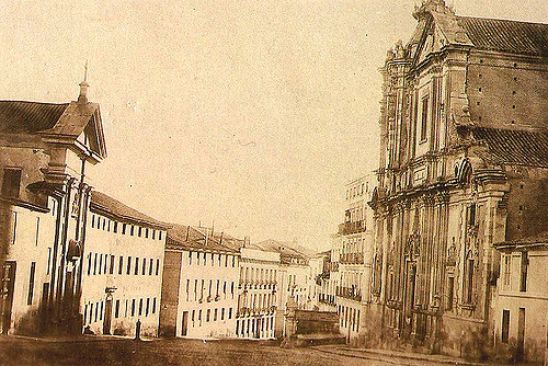 Foto de la calle de San Bernardo (ca.1859). Se distinguen, a la izquierda, los edificios de la iglesia y convento de las Salesas Nuevas, y a continuación el caserón del conde de Celanova, que sirvió de convento de Santa Clara cuando José Bonaparte derribó el antiguo monasterio de esta orden que se encontraba cercano al Palacio Real, y que posteriormente se transformó en la Escuela Normal de Maestros. A la derecha la iglesia de Montserrat e invadiendo la calzada, el arca y la fuente de Matalobos.